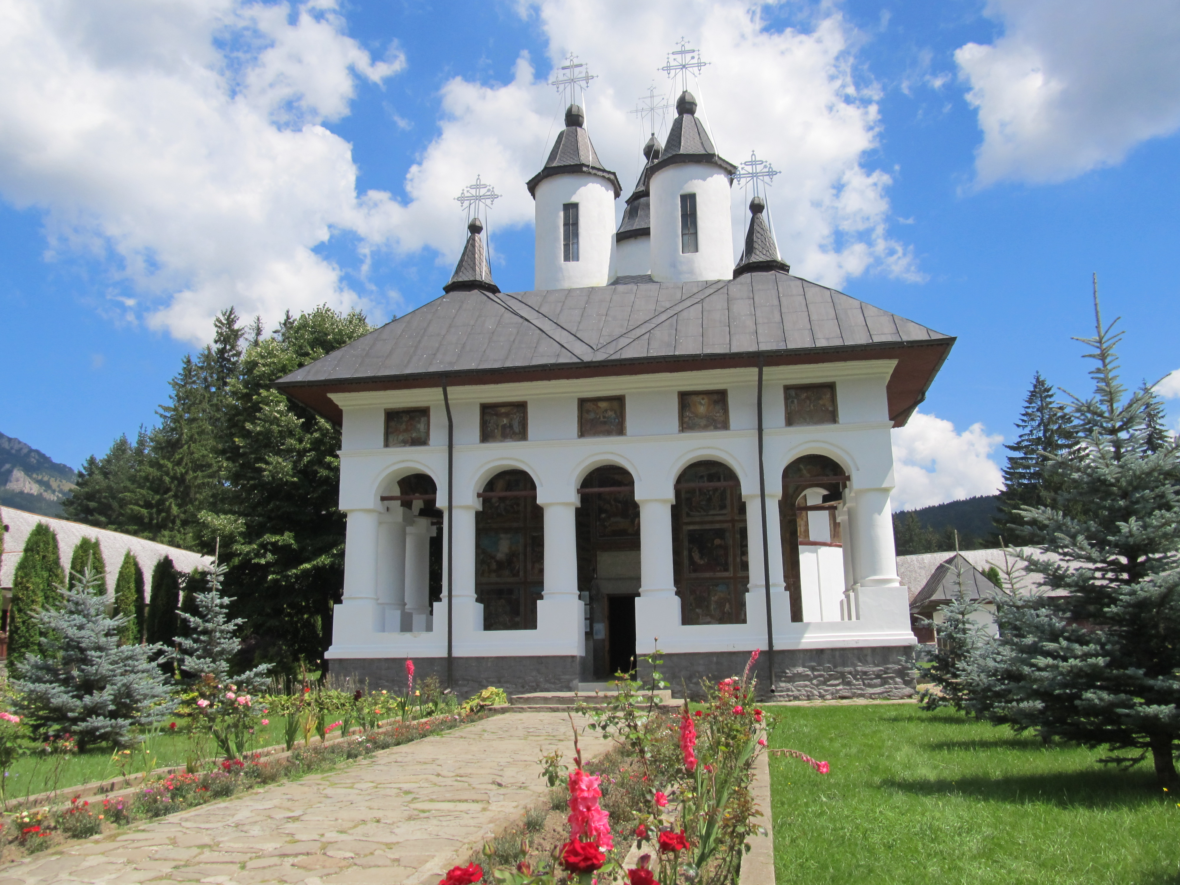 Mănăstirea Cheia din județul Prahova, vedere înspre pridvor. 06